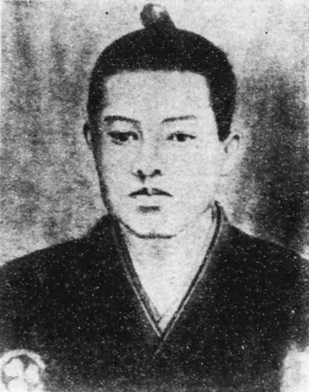 西山謙之助尚義の画像。作者不明。